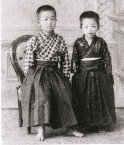 幼少期の石原莞爾と弟の次郎。